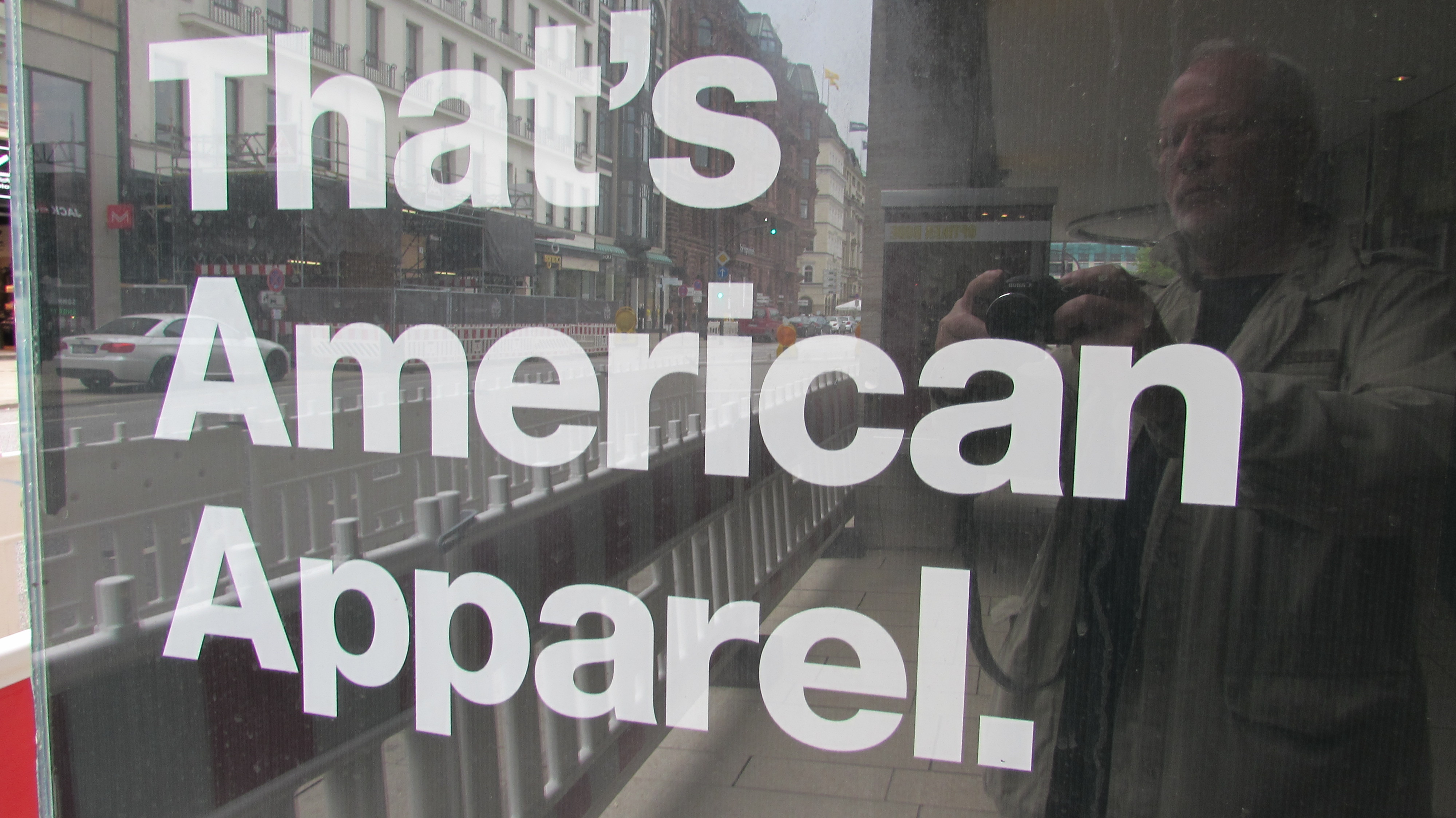 AmericanApparelHamburg